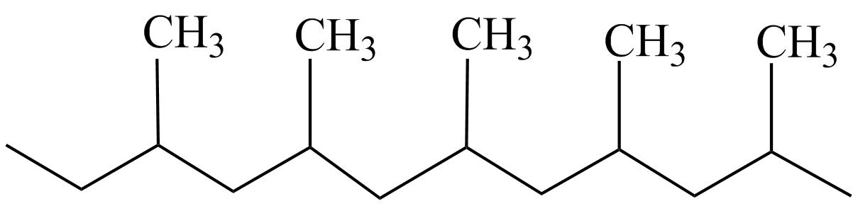 Структурна формула ізотактичного полімеру пропілену